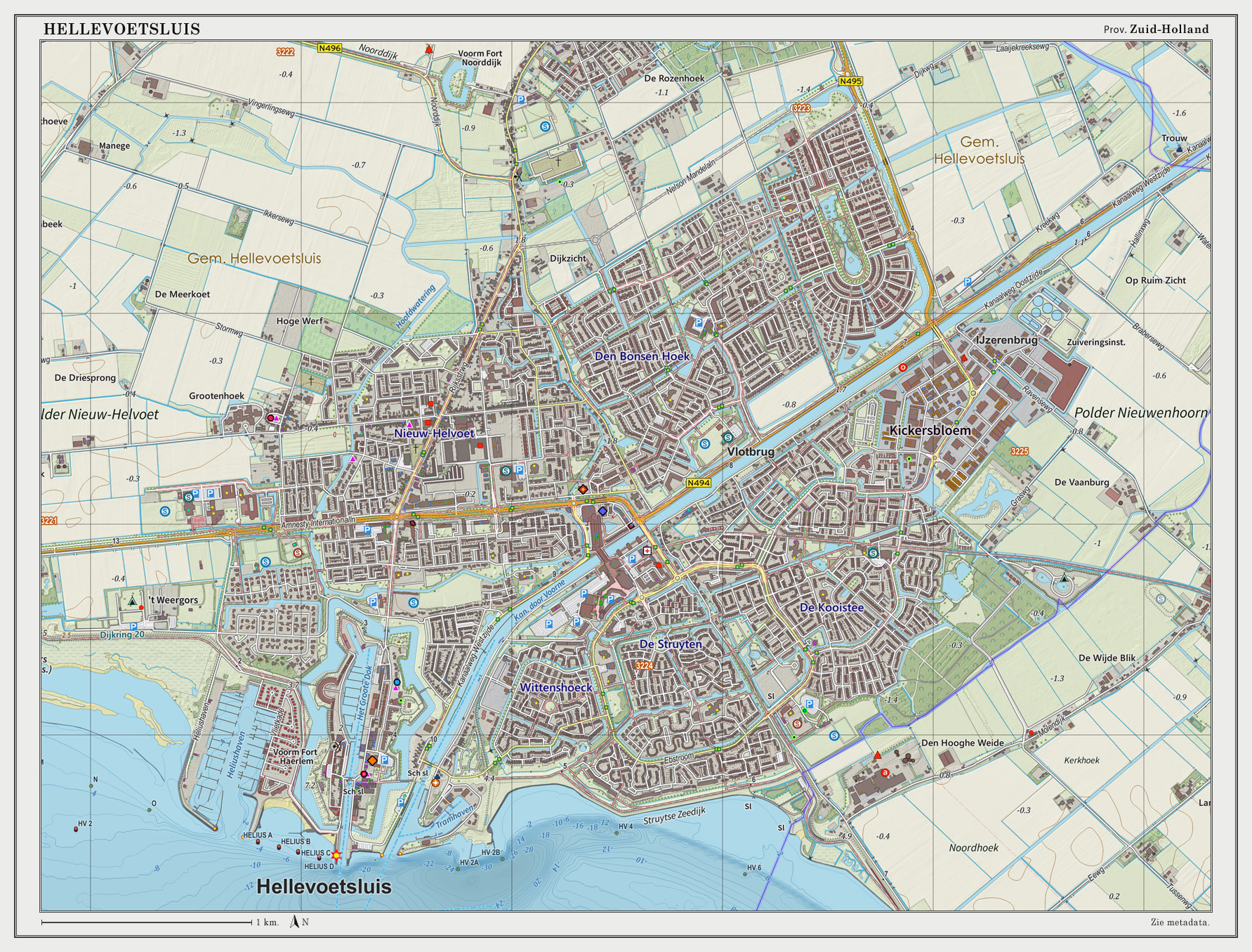 Topografische kaart van Hellevoetsluis (woonplaats). Resolutie: 300 pixels/km. Kaartbeeld samengesteld uit de open geodata van de Top10NL en Top25namen (Basisregistratie Topografie, Kadaster), Creative Commons BY licentie. Gebouwvlakken uit open geodata BAG extract. Wegen uit de OpenStreetMap, OpenStreetMap community. Reliëfschaduw uit de Actuele Hoogtekaart AHN2. Samenstelling en kleurenschema: Jan-Willem van Aalst, met QGIS2. Zie ook de Legenda.